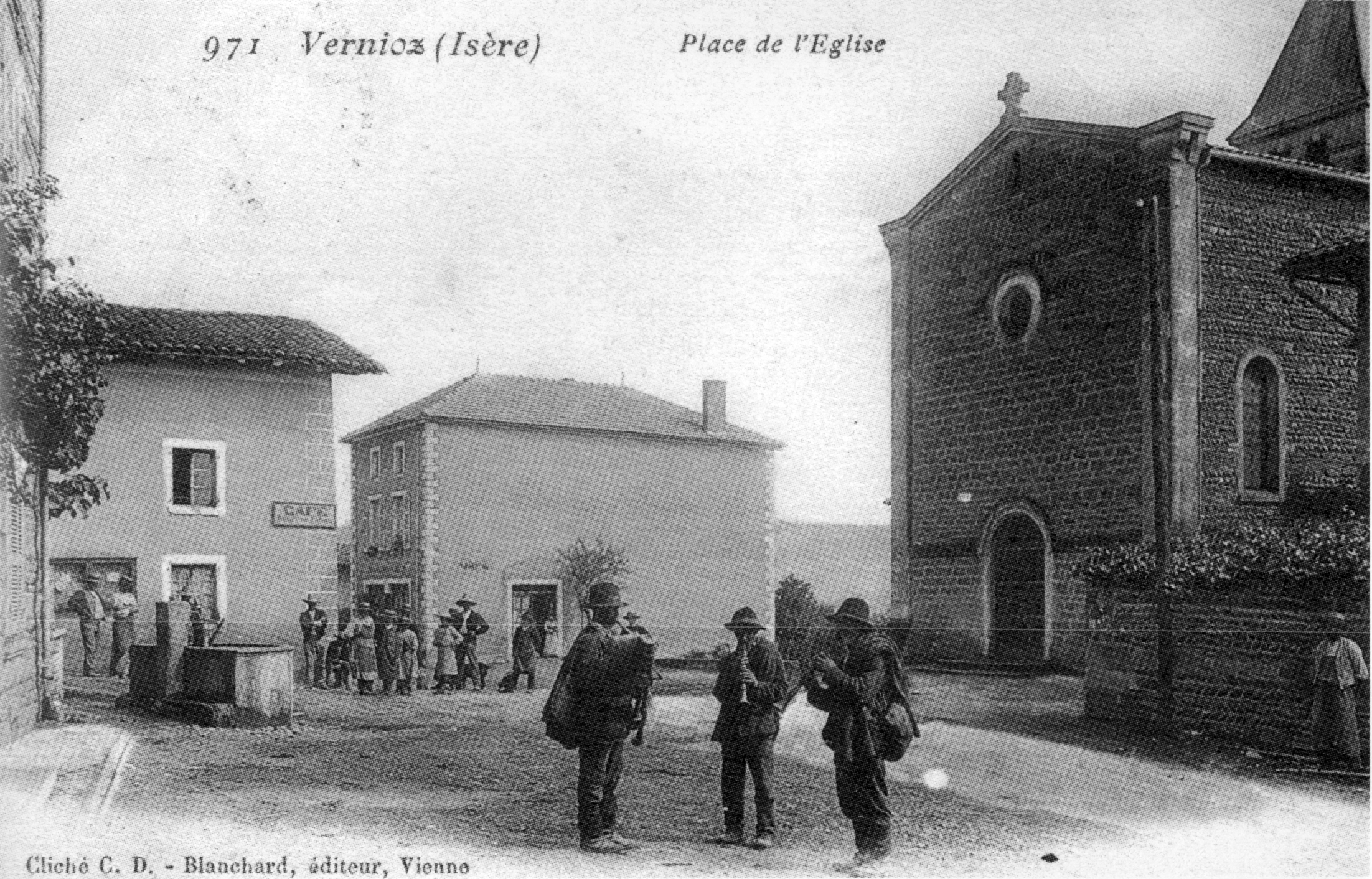 Vernioz, place de l'église en 1910